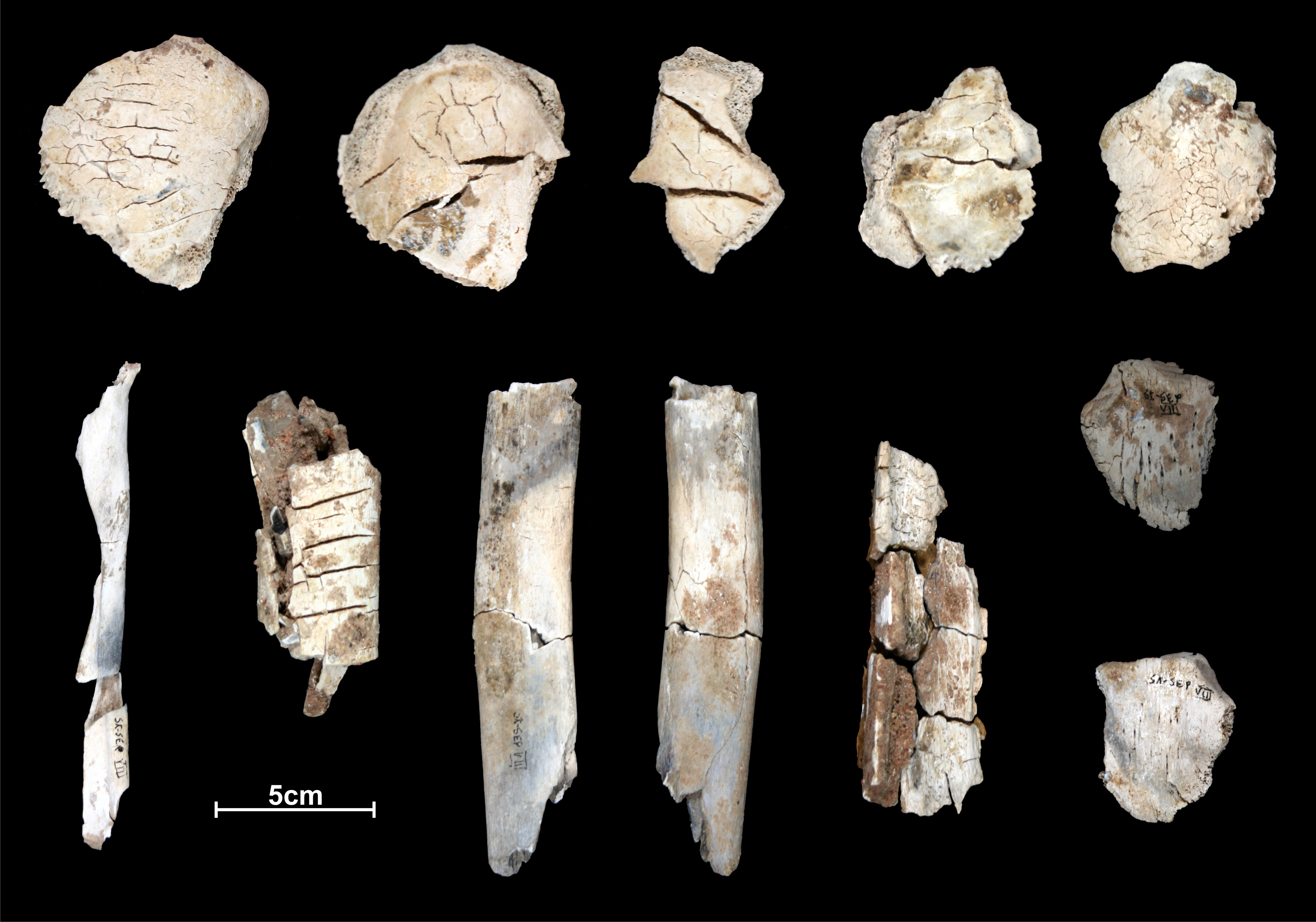 Lapa do Santo - Sepultamento 08 - Detalhe ossos queimados. O Sepultamento 8 é o úncido do sítio que constituí uma cremação completa. Na fileira superior, ossos do crânio. Na fileira inferior, rádio esquerdo, fêmur direito, úmero, tíbia, patela direita (superior) e patela esquerda (inferior).